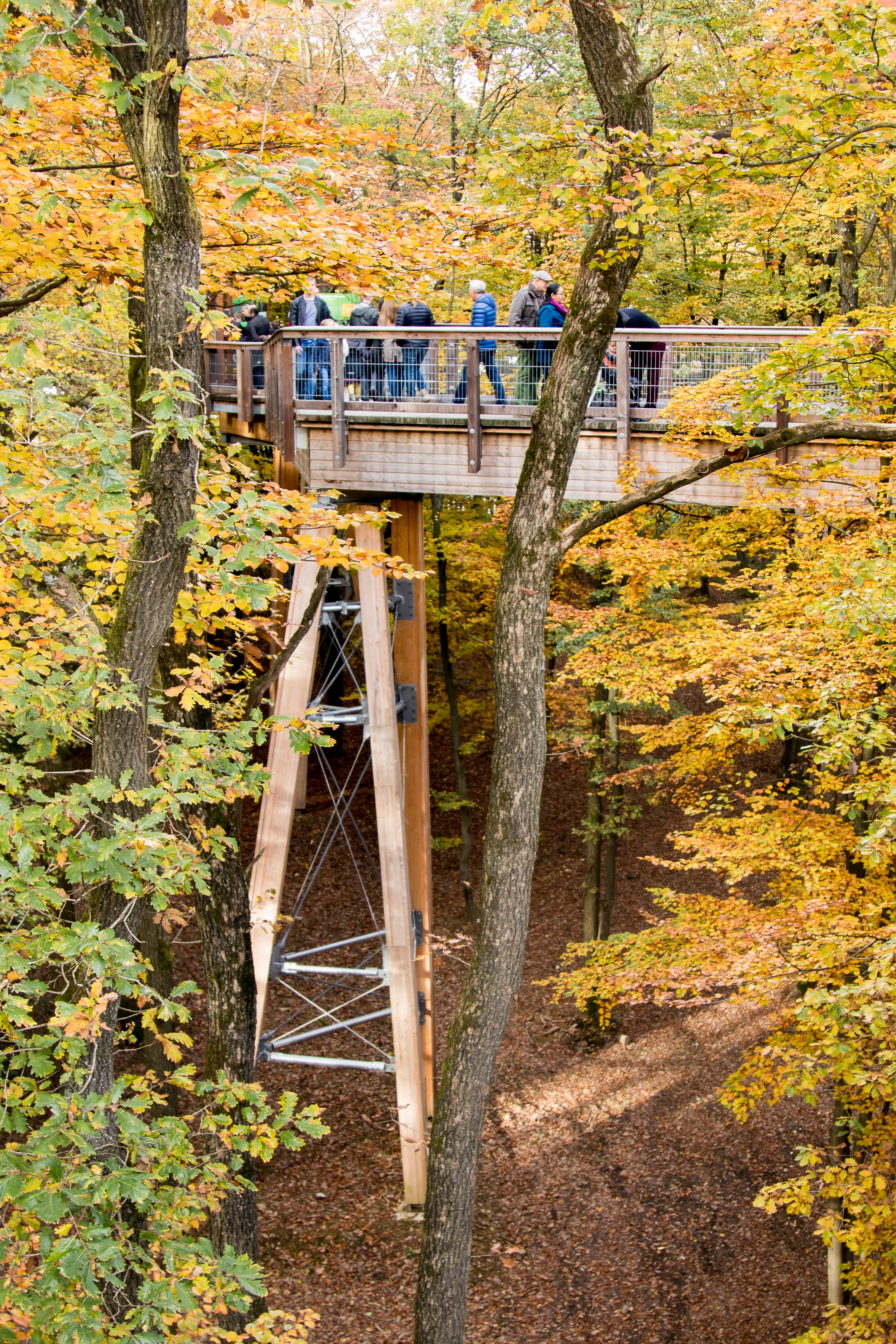 Baumwipfelpfad im Panarbora-Park in Waldbröl